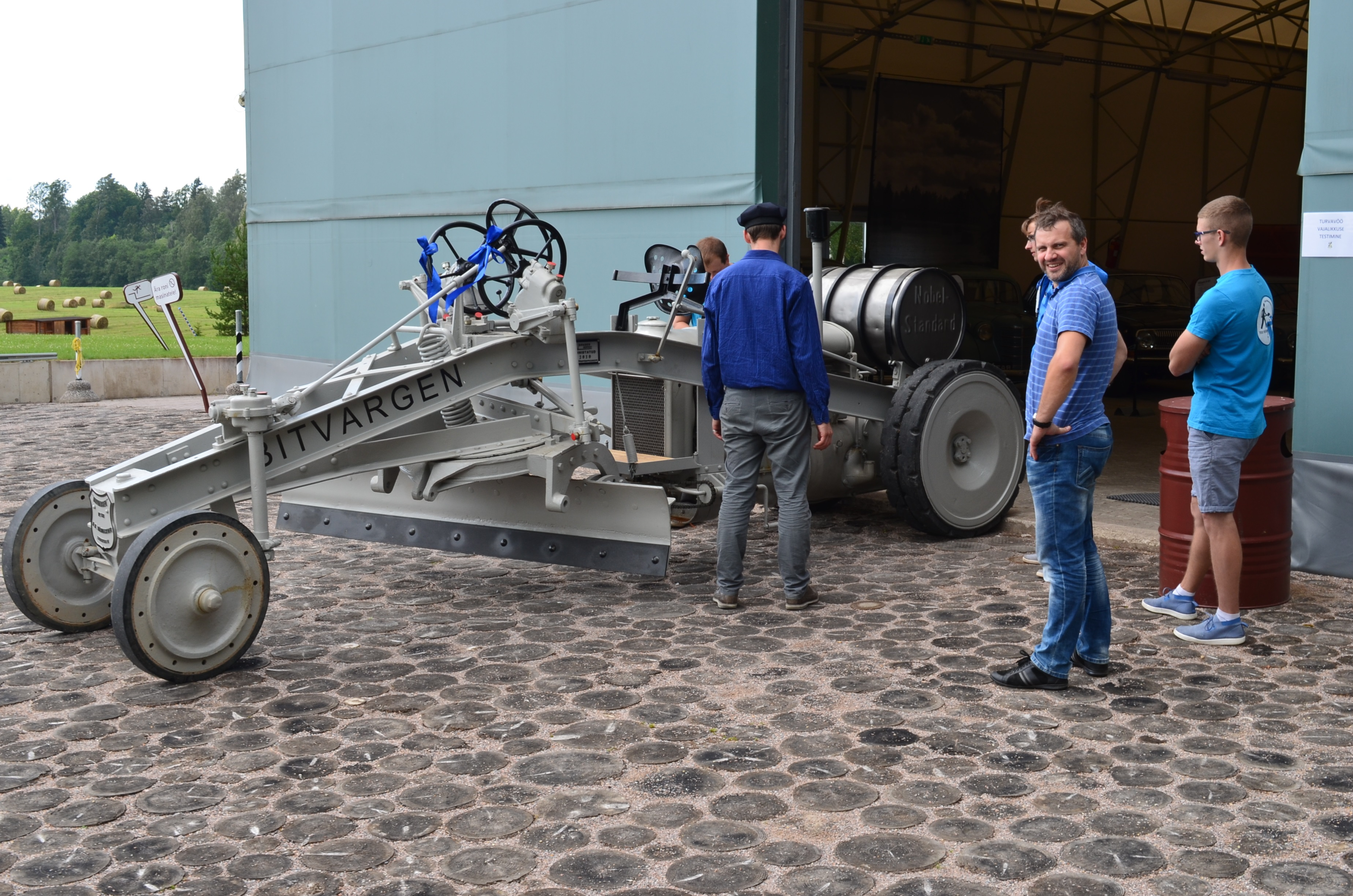 Bitvargenile lüüakse hääled sisse.